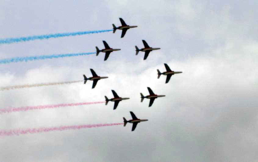 Aerobatics